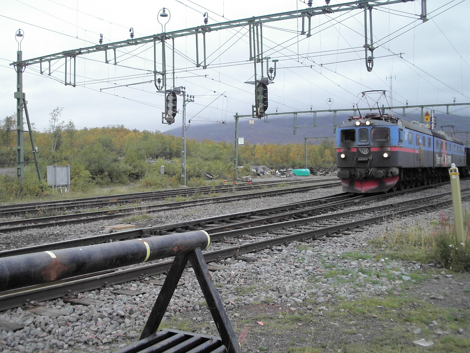 Malmlok vid Abisko Östra